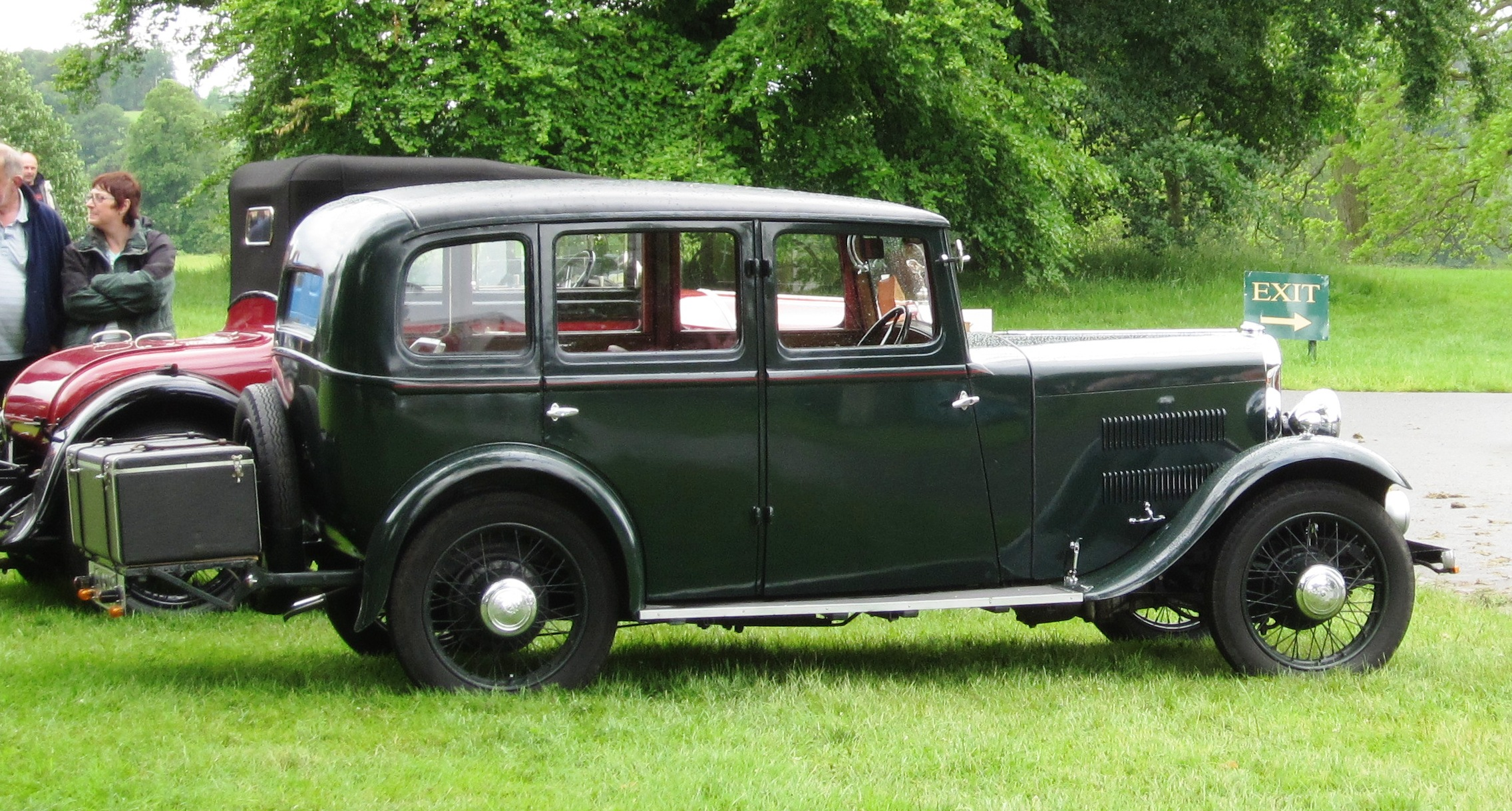 Rover 10/25